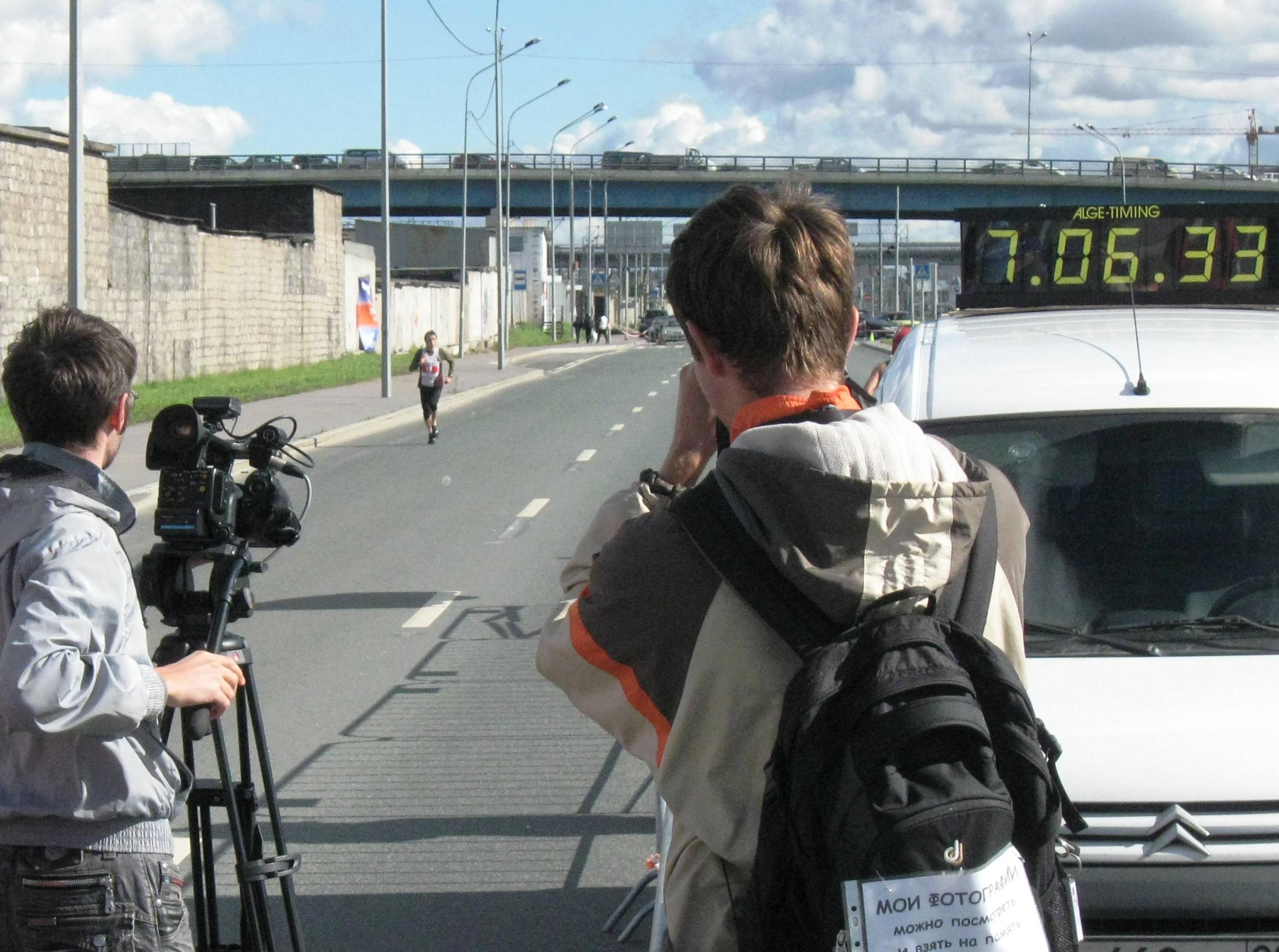 26-й массовый пробег “Испытай себя” – Кубок России по бегу на 100 км (Санкт-Петербург, Россия). Финиш победителя на дистанции 100 км Алексея Измайлова (Рыбинск). Время 07:06.47.